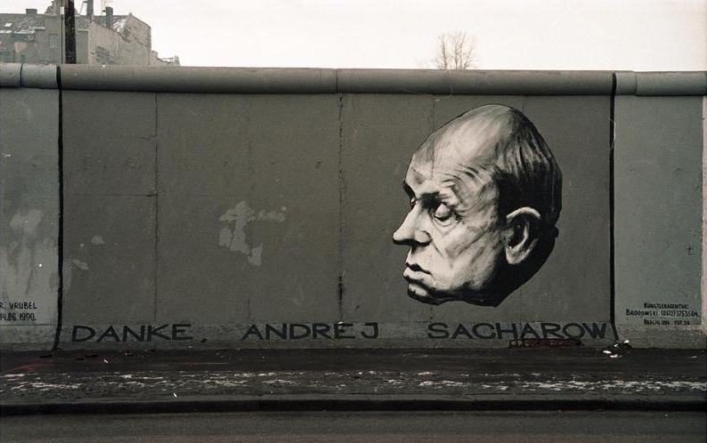 19.12.1990 "East-Side-Galery", gelegen zwischen der Jannowitzbrücke und der Oberbaumbrücke Reste der Berliner Mauer, die nach der Öffnung von vorwiegend ostdeutschen Künstlern auf der Ost-Seite bemalt wurden